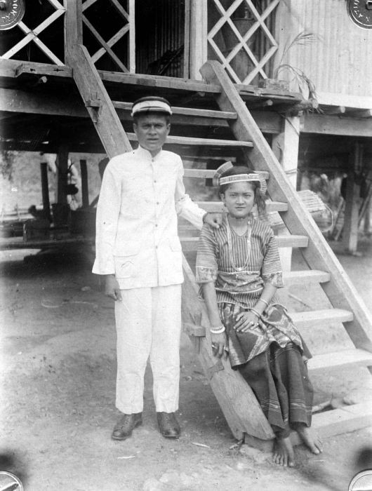 Repronegatief. De vorst en vorstin van Kulawi, Celebes